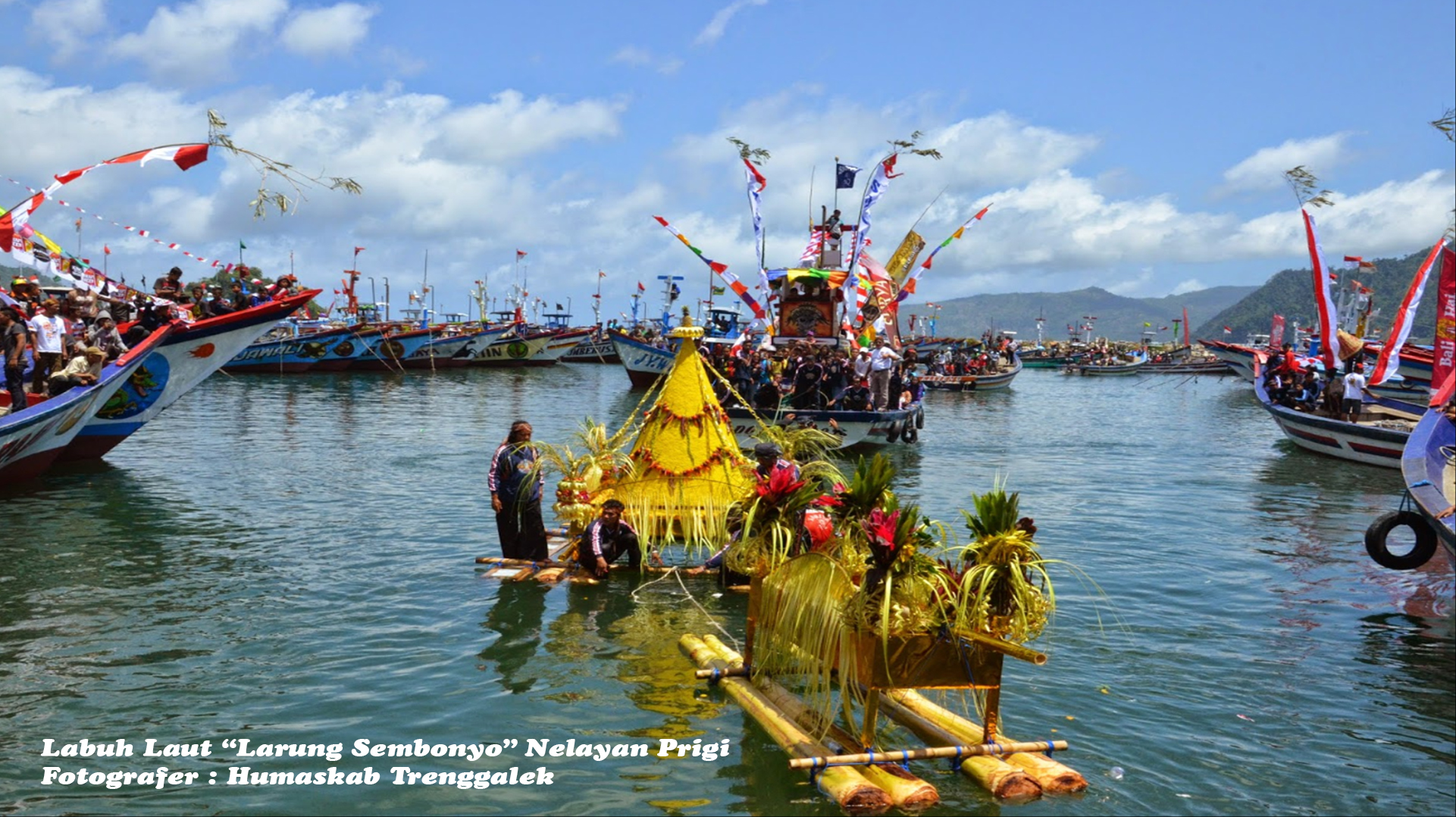 LABUH LAUT "LARUNG SEMBONYO" NELAYAN PRIGI 2014